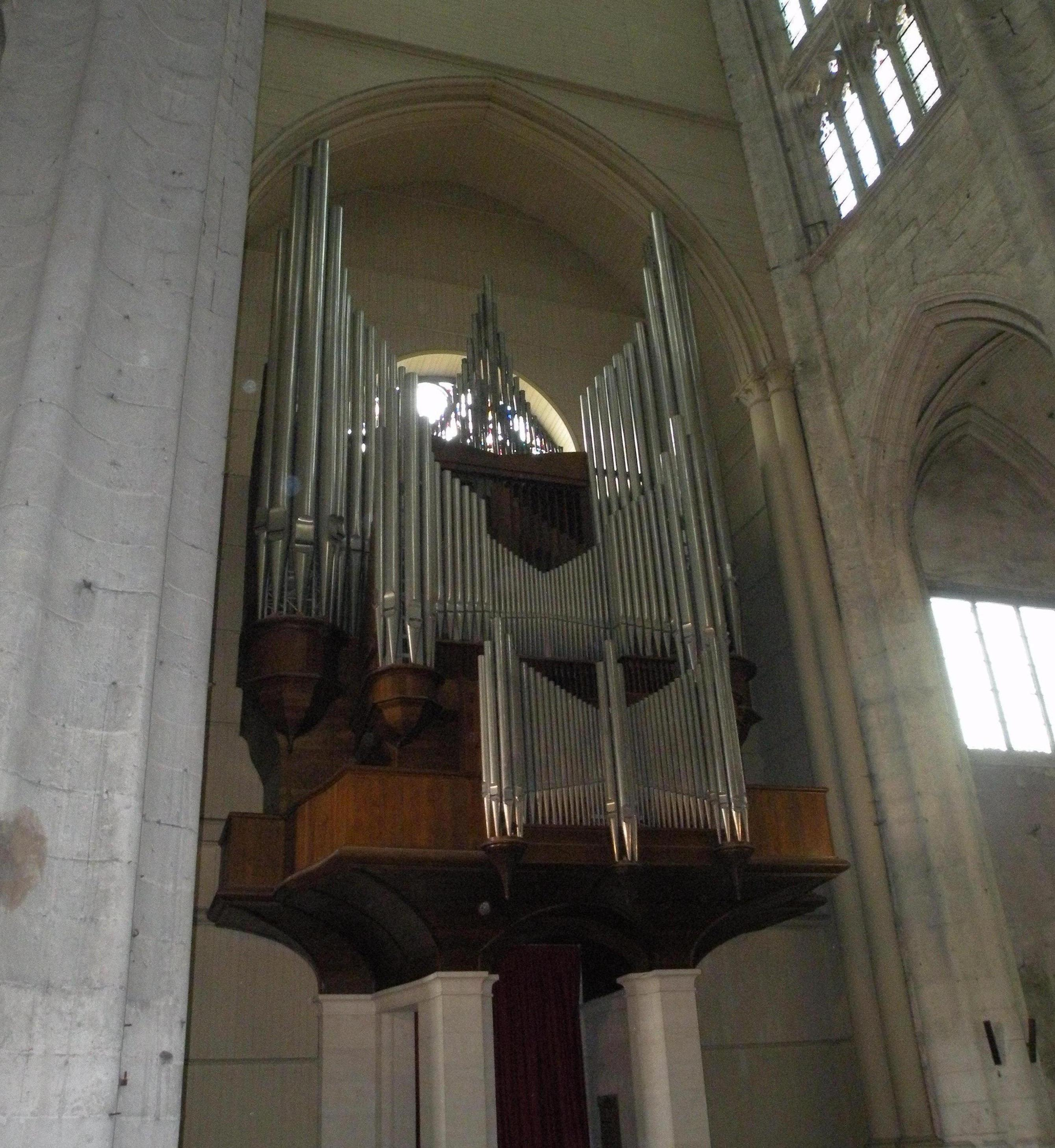 orgue de la cathedrale de beauvais